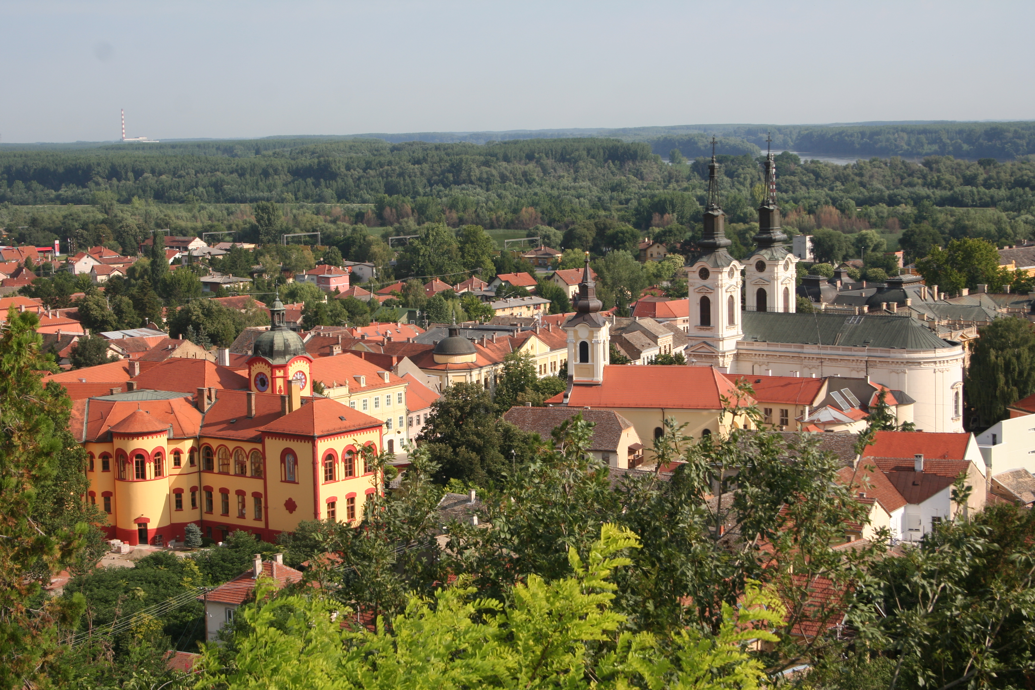 Vidikovac Sremski Karlovci